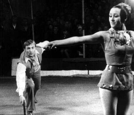 Nuo 1991 m. Lietuvoje įkurto magijos teatro „DiArchy“ kostiumų dailininkė, savo vaikų-artistų asistentė-padėjėja